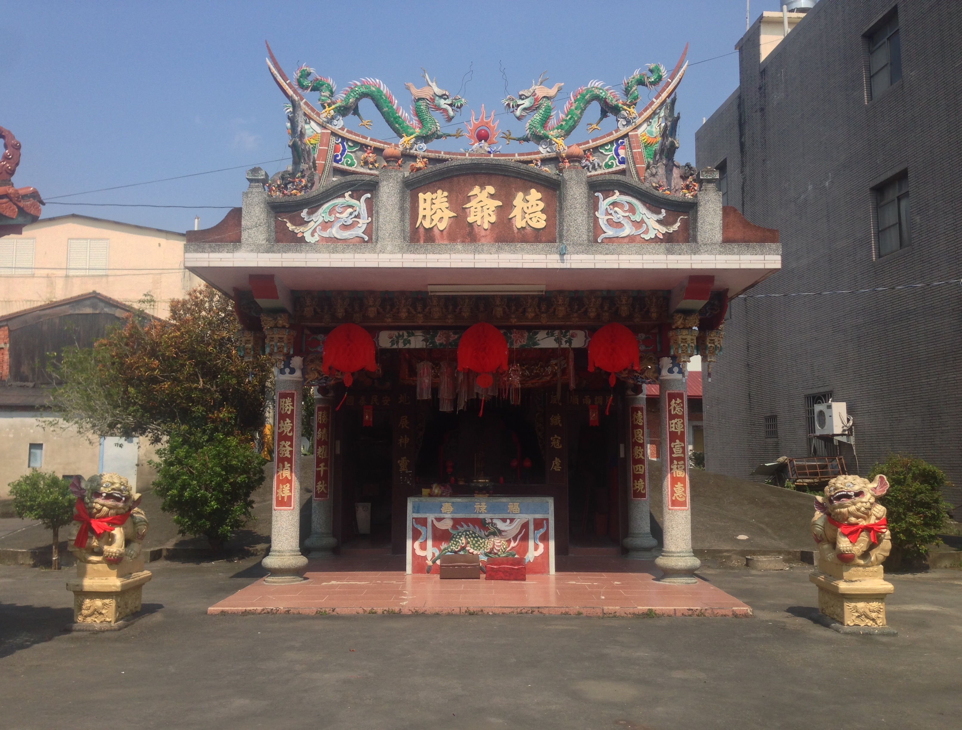 美濃德勝公壇